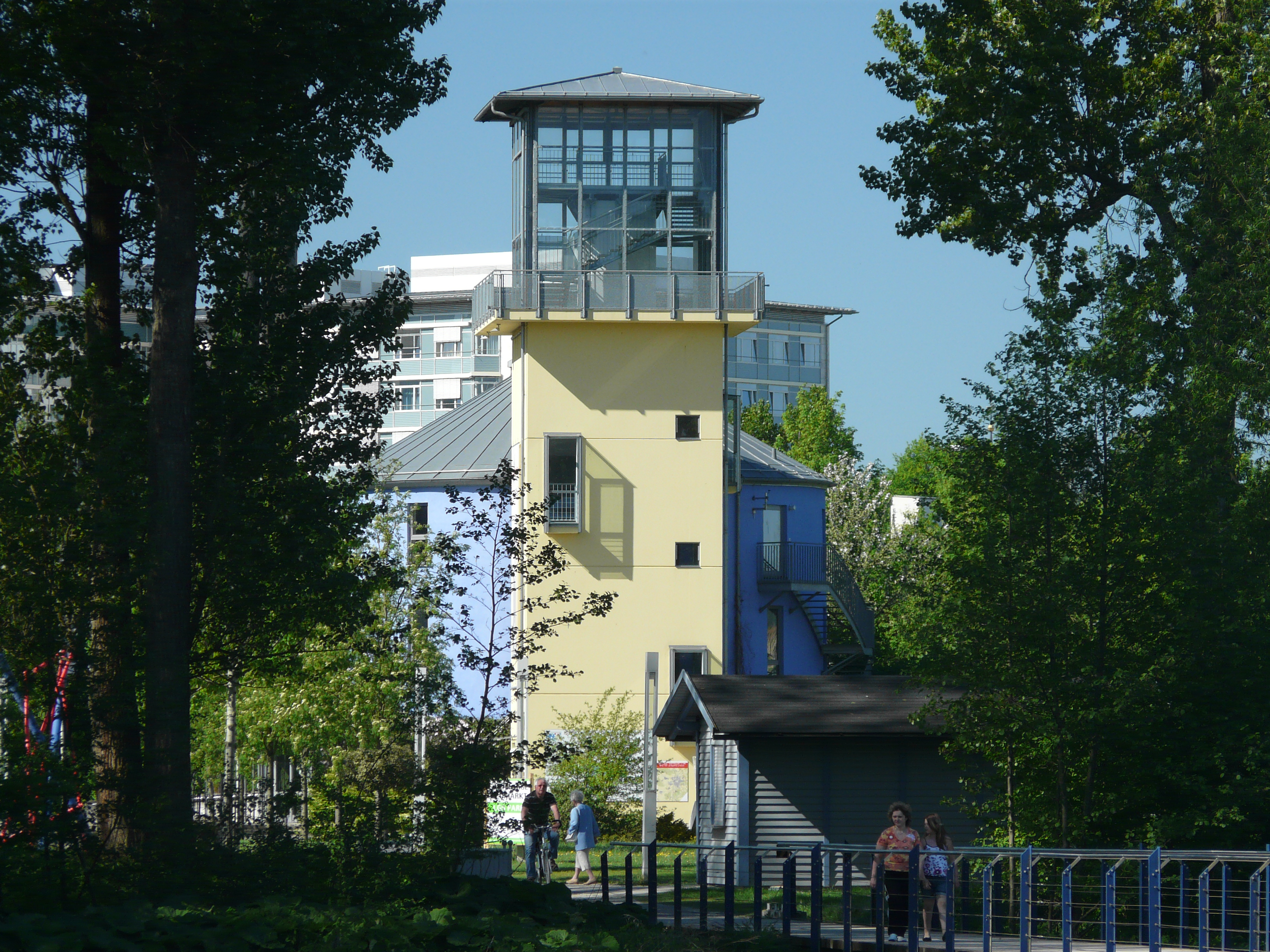 Turm im LGS-Park von Neumarkt in der Oberpfalz.